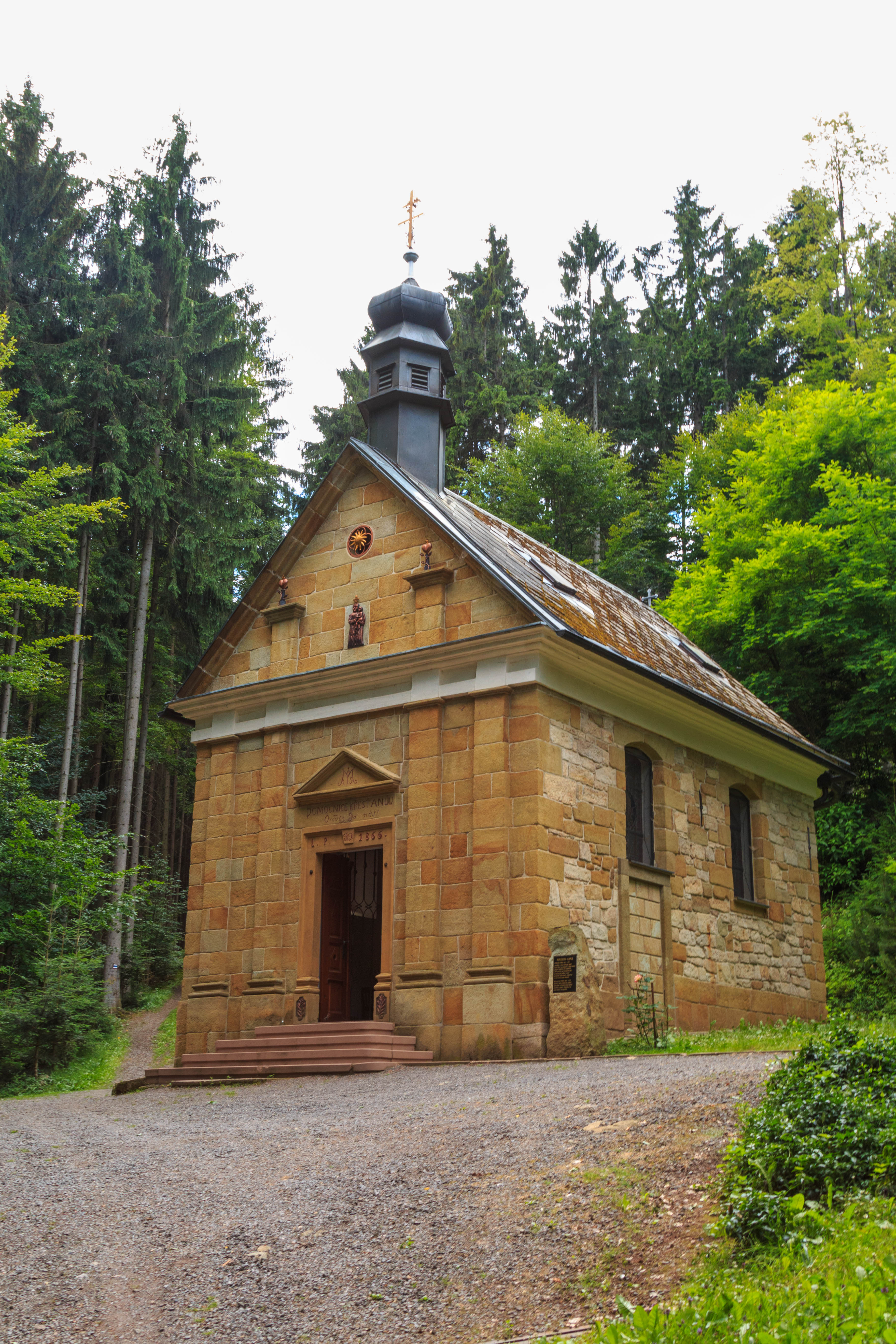 Horákova kaple u Dolní Dobrouče